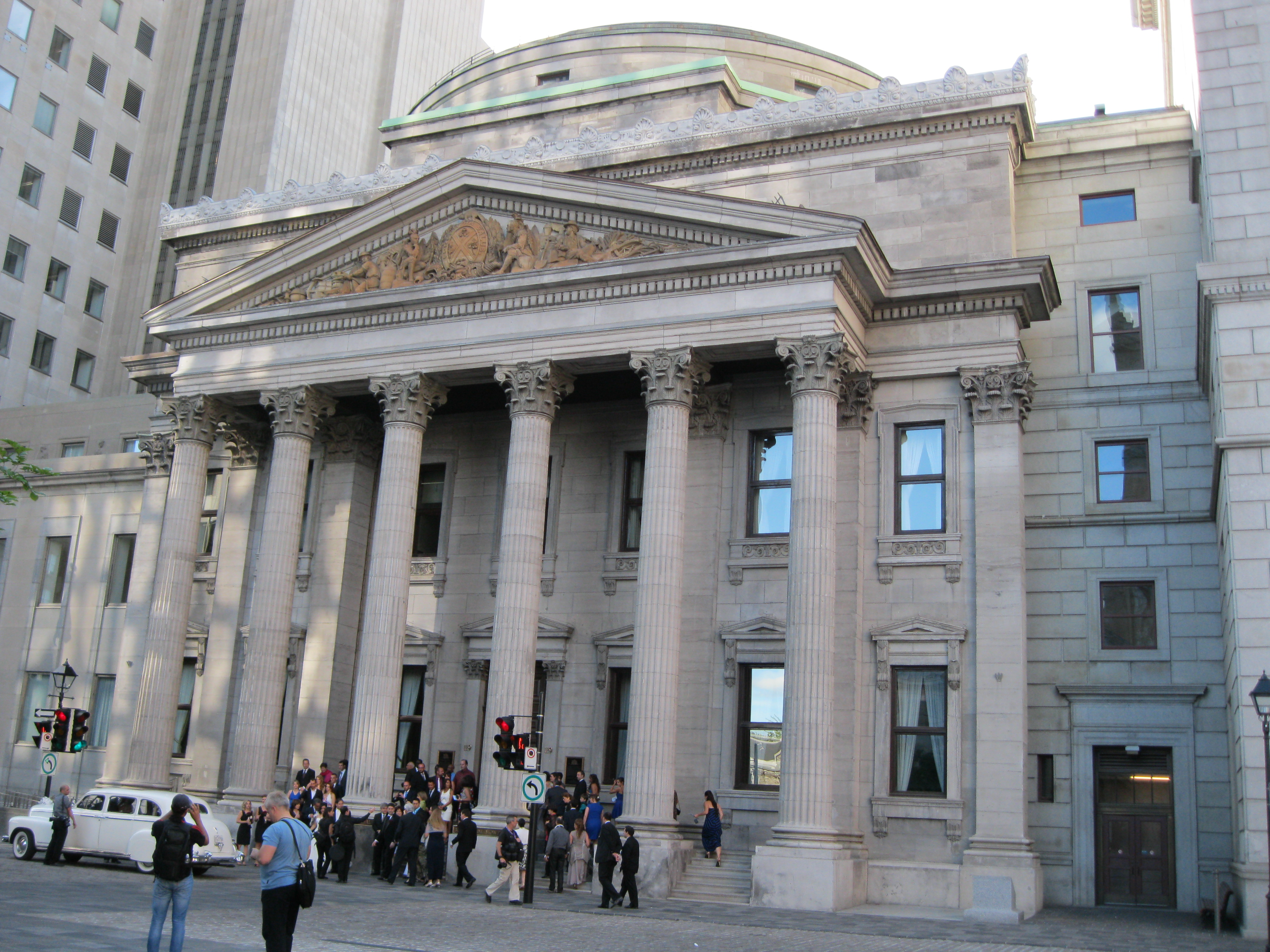 Le siège social de la Banque de Montréal, au 129, rue Saint-Jacques à Montréal. Construit en 1845 sur des plans de John Wells.